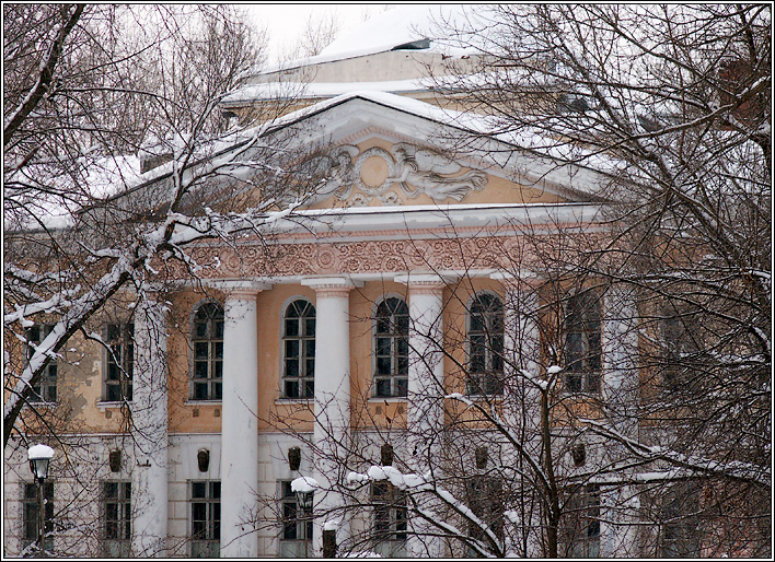 Главный корпус коноваловской больницы в Вичуге